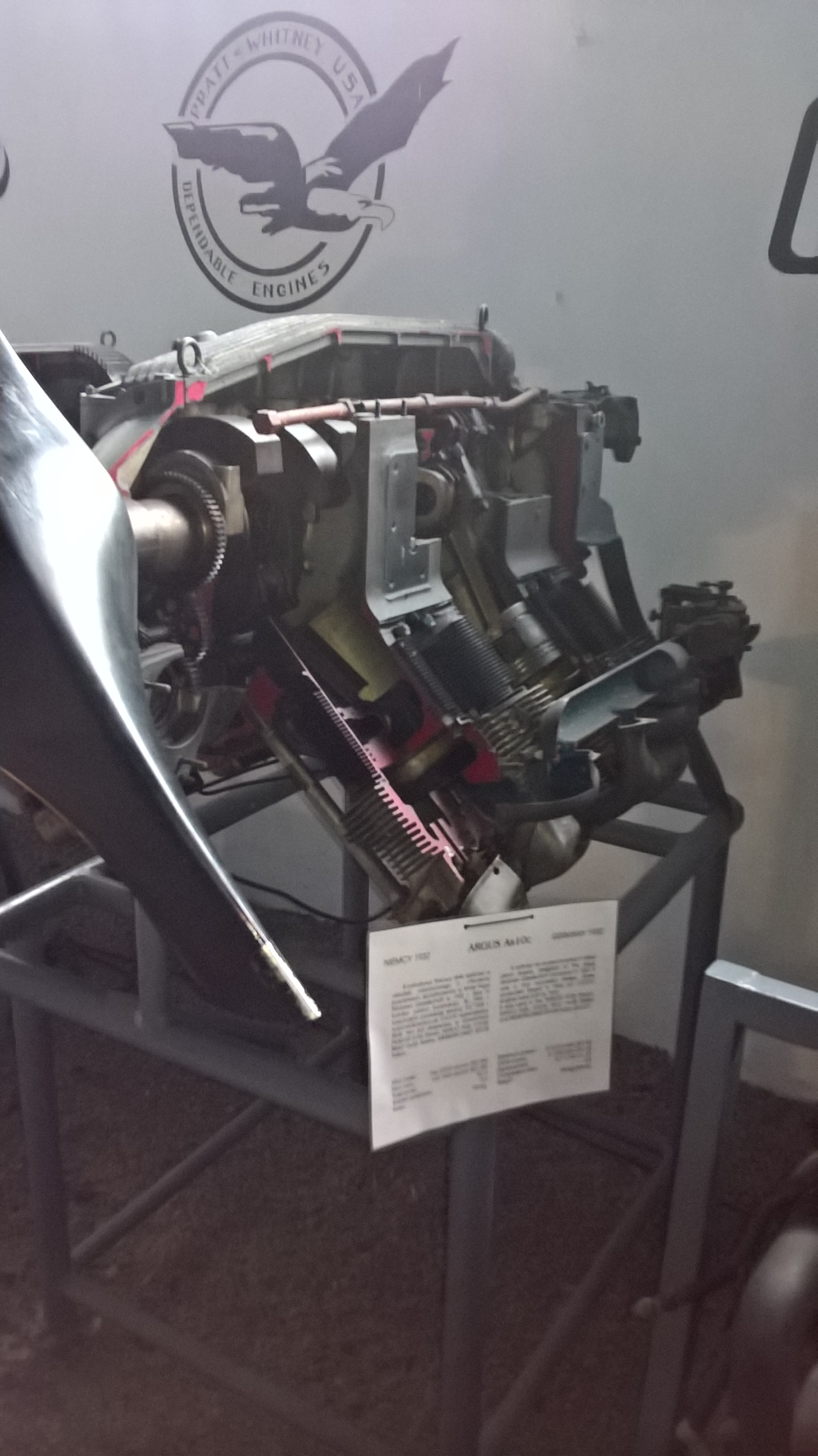 Niemiecki 8-cylindrowy silnik widlasty Argus As-10c z 1932 r. ze zbiorów Muzeum Lotnictwa Polskiego w Krakowie.